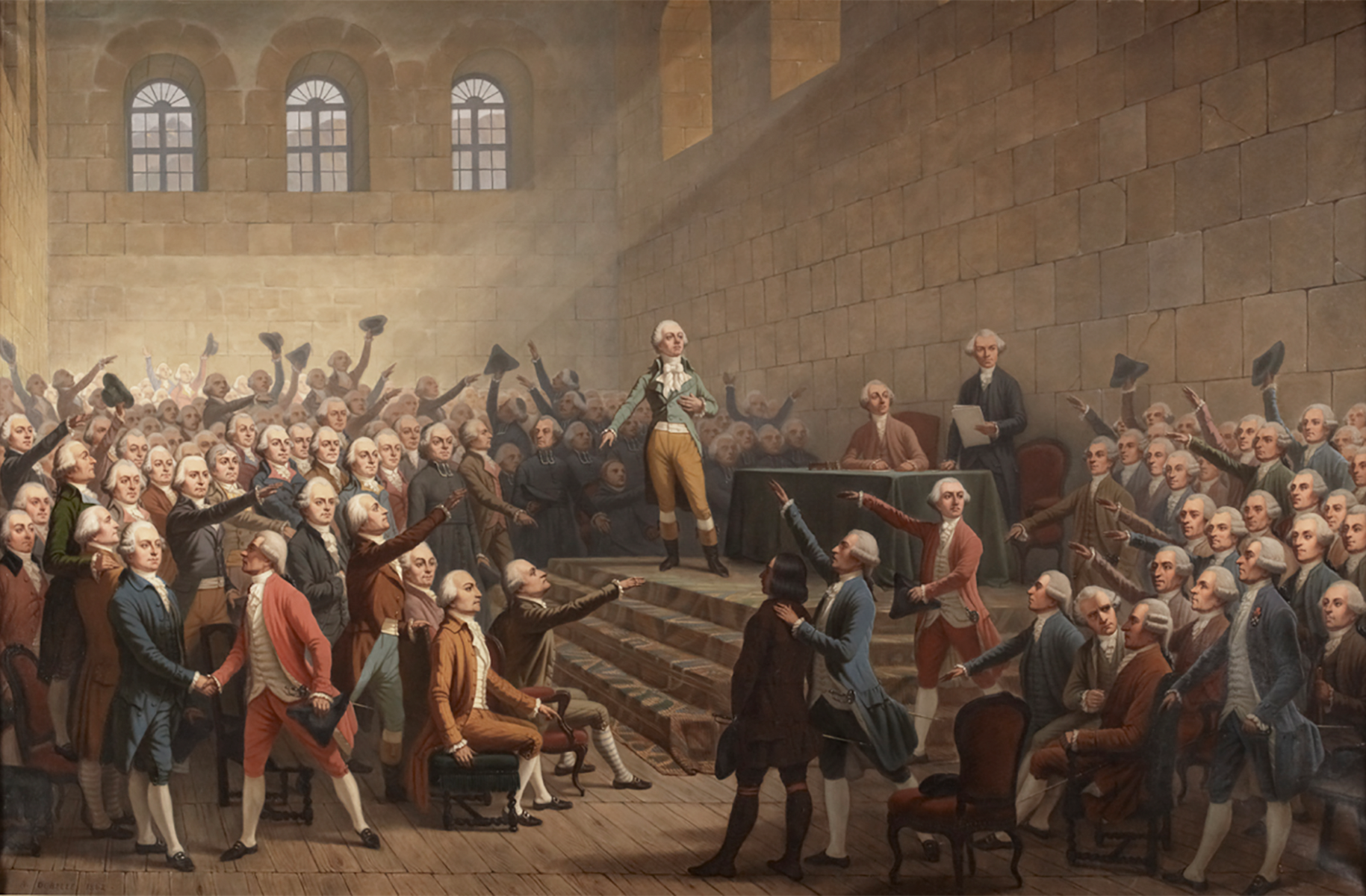 Le 21 juillet 1788, 491 représentants des Trois Ordres du Dauphiné se réunissent au Château de Vizille dans la salle du Jeu de Paume. Cette assemblée lance un appel à la nation toute entière pour définir un nouvel ordre politique.